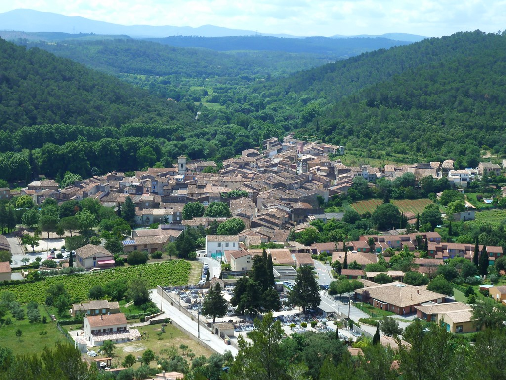 Village de Cabasse (Var - France) vu depuis la colline des Draboux.